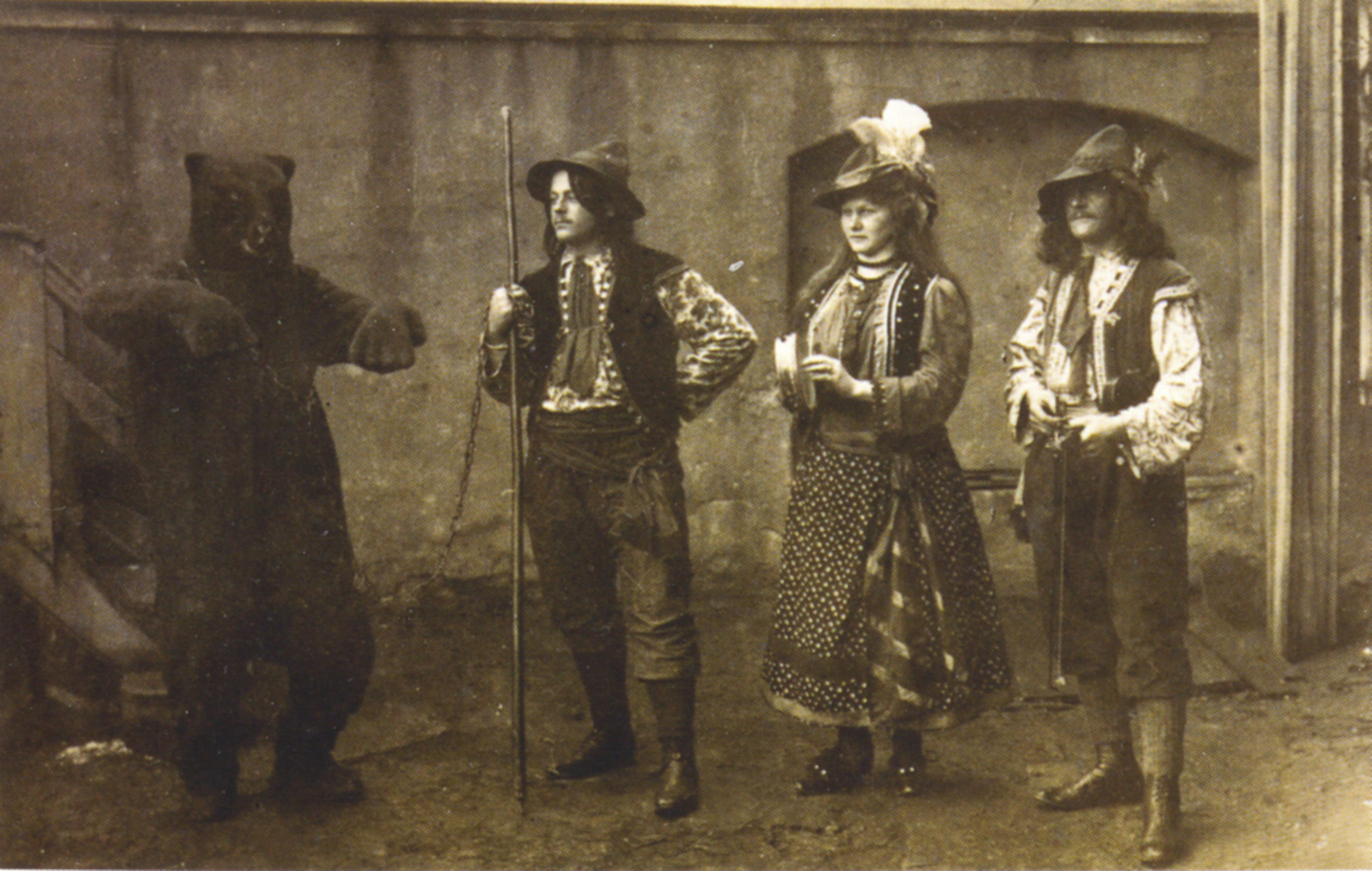 Weingarten (Württemberg), Kostümgruppe „Zigeuner“ (ein beliebtes Fastnachtssujet der Zeit), 1910